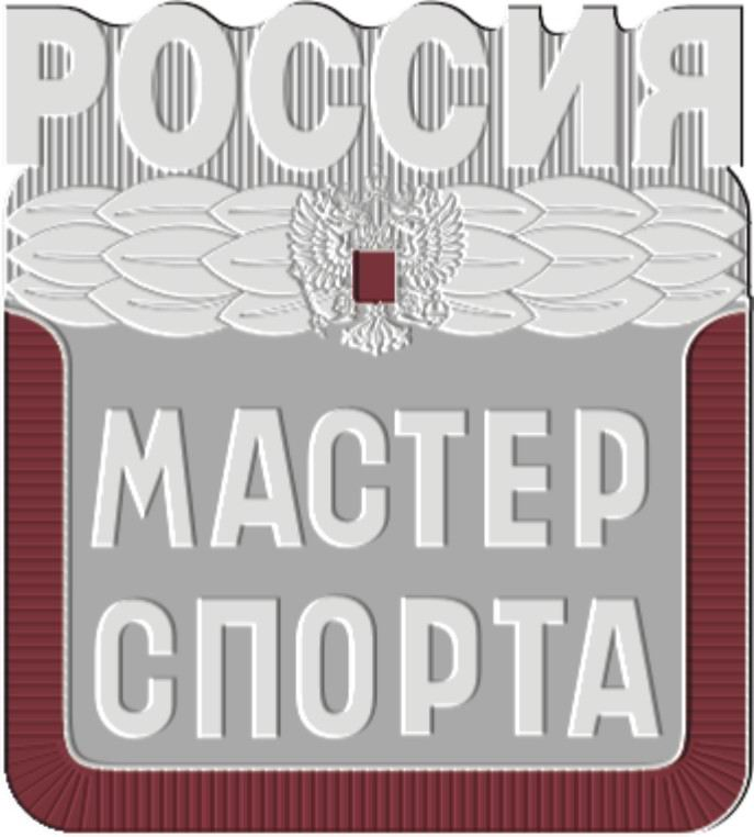 Знак к спортивному званию «Мастер спорта России»